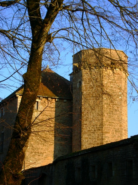 Tour du château de Thizy (Yonne)